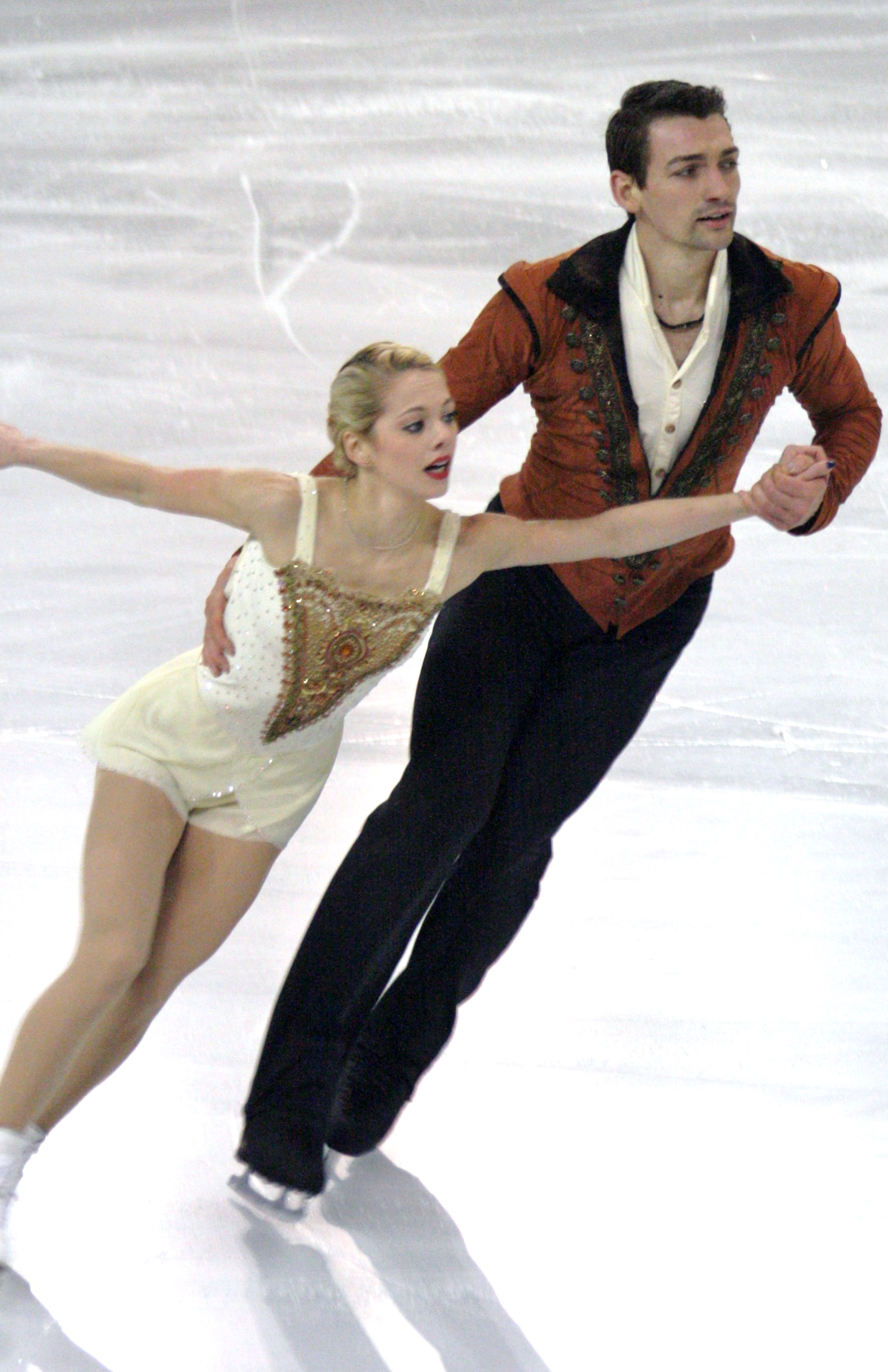 Алекса Шимека и Крис Книрем (США) на финале Гран-при по фигурному катанию 2015-2016.